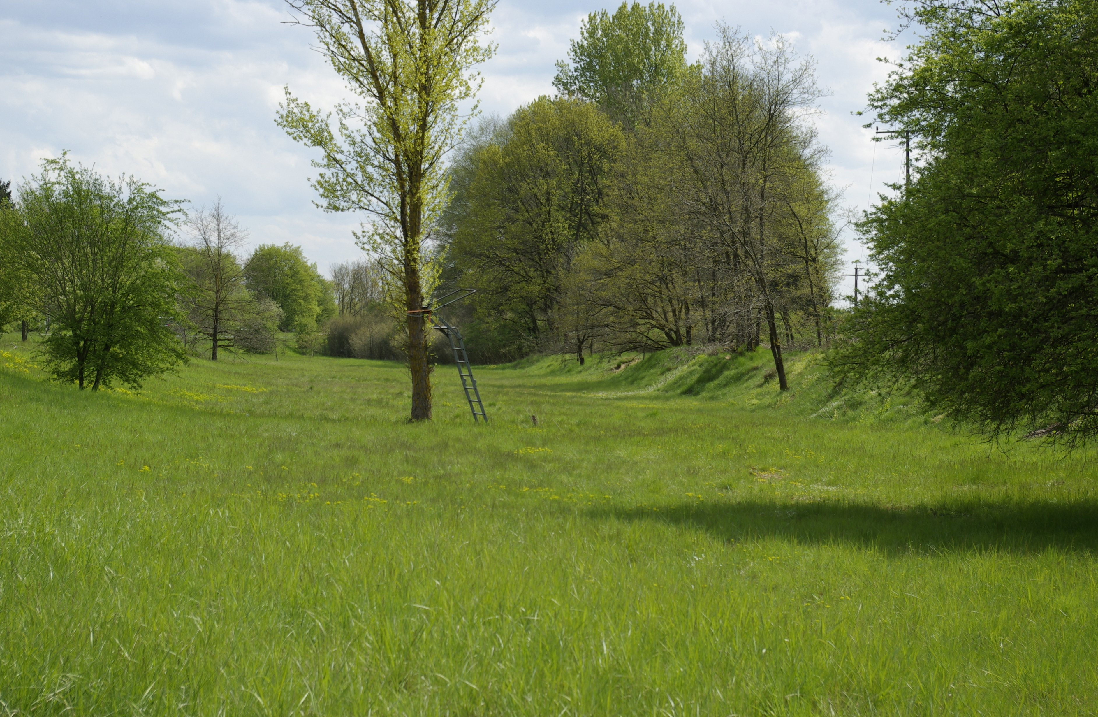 Das an dieser Stelle trockene Bett des Ludwig-Donau-Main-Kanals in Forchheim, südlich von Eggolsheim, ist noch deutlich in der Landschaft zu erkennen. Es ist Teil des Naturschutzgebietes Büg bei Eggolsheim.